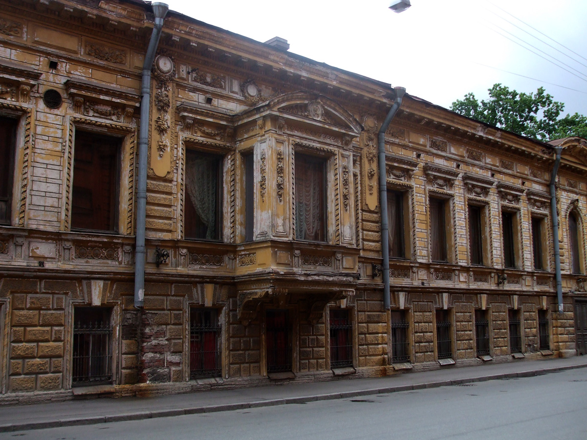 Кожевенная линия (Санкт-Петербург)